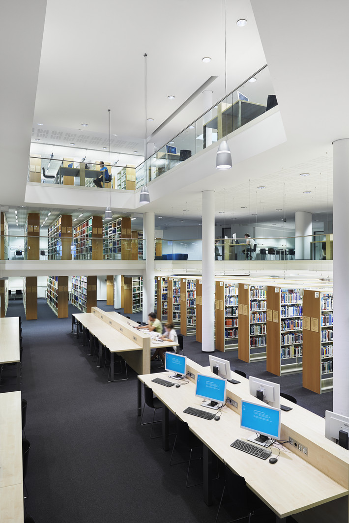 Großer Lesesaal im Hauptgebäude der Universitätsbibliothek Ilmenau